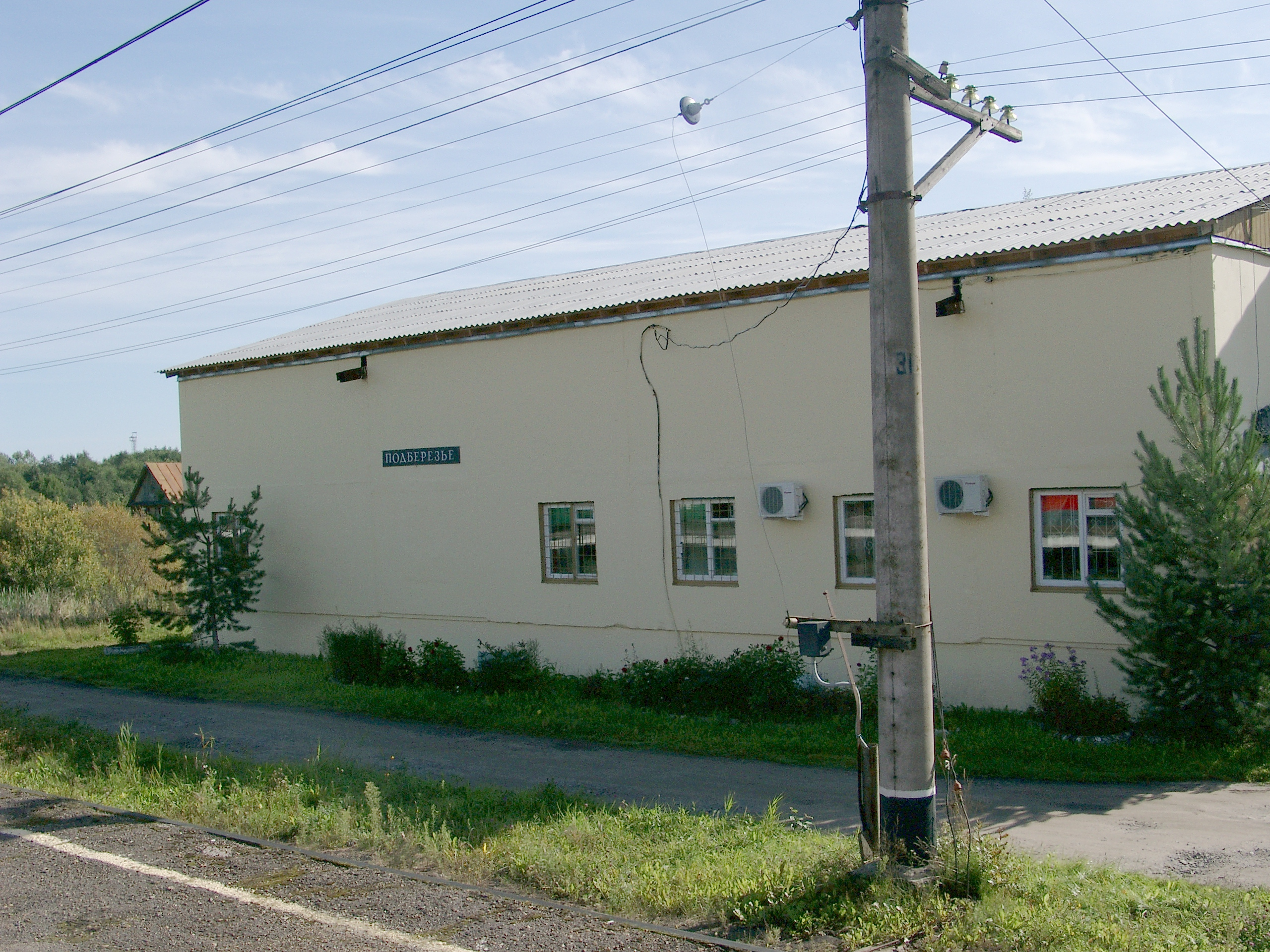 Железнодорожная станция Подберезье, Новгородская область, Россия. Здание вокзала